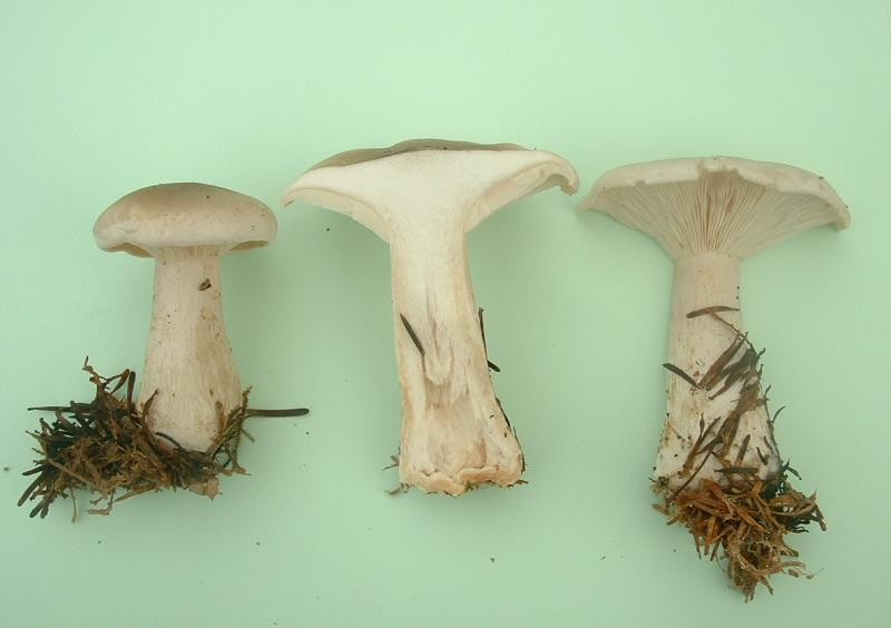 Clitocybe nébuleux, Gy (Haute-Saône)